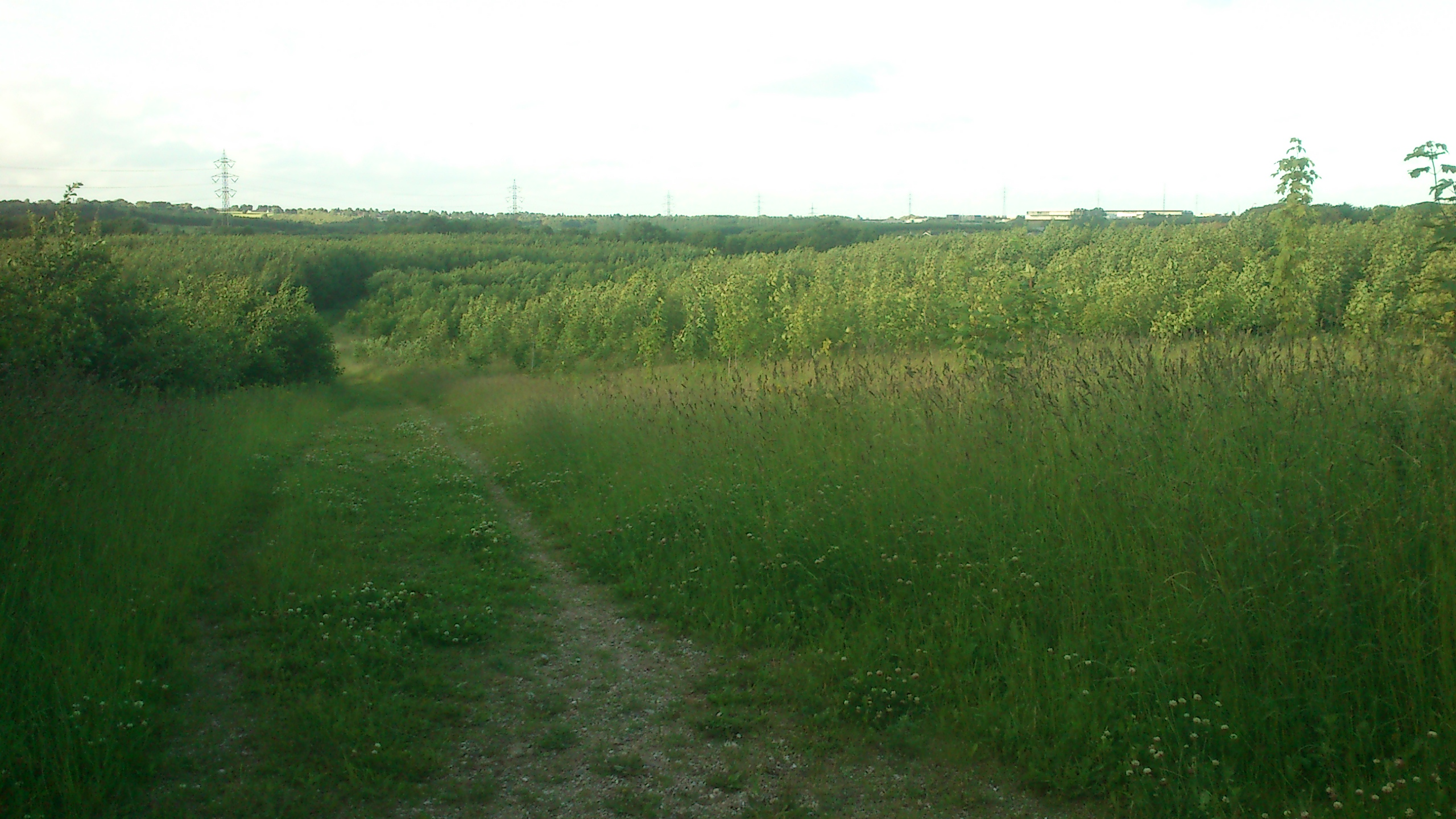 Fra den nyrejste del af Årslev Skov, med True Skov i nord.